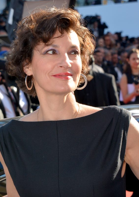 Jeanne Balibar au festival de Cannes